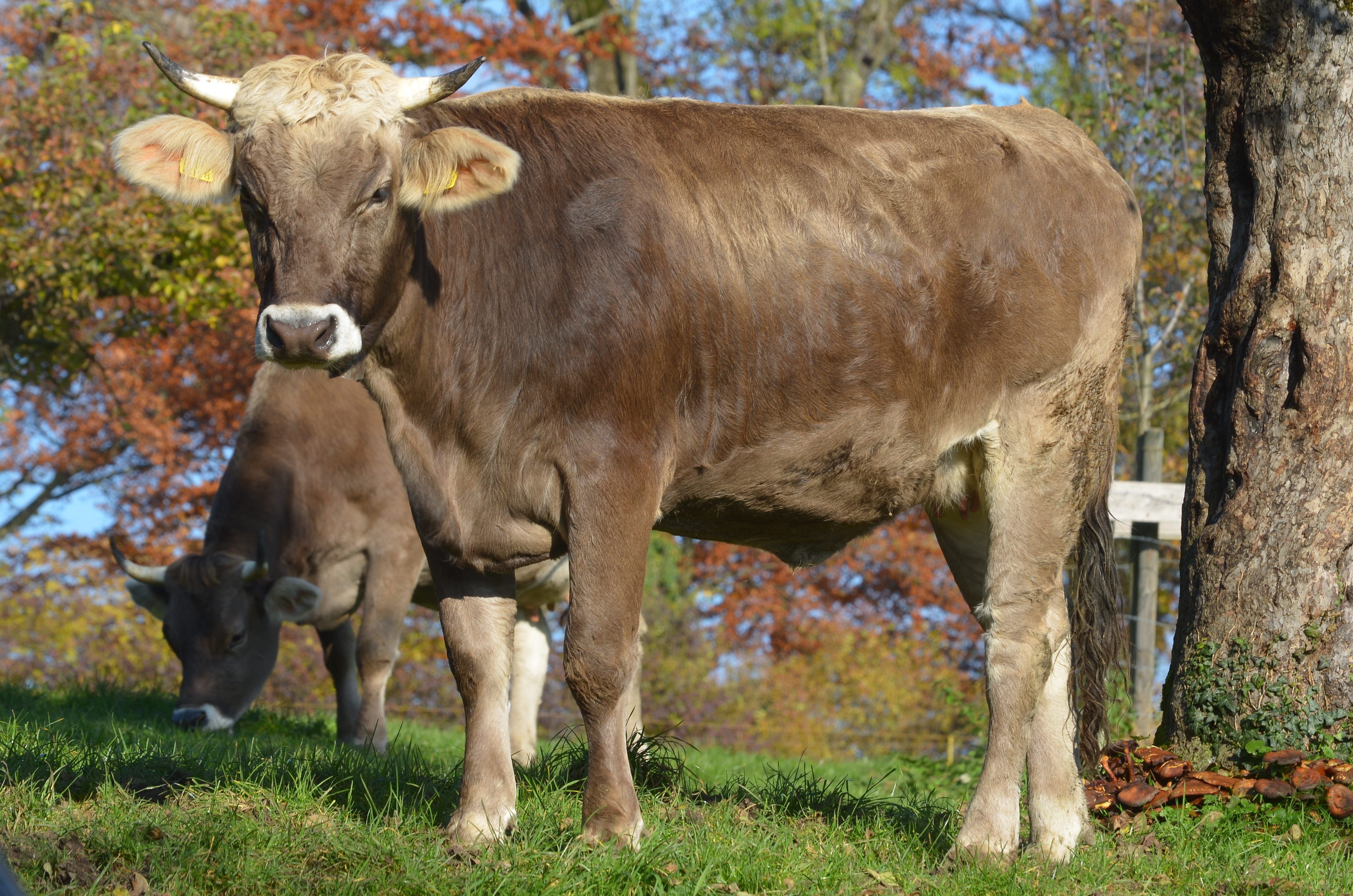 Braunvieh, Schloss in Uster (Switzerland)